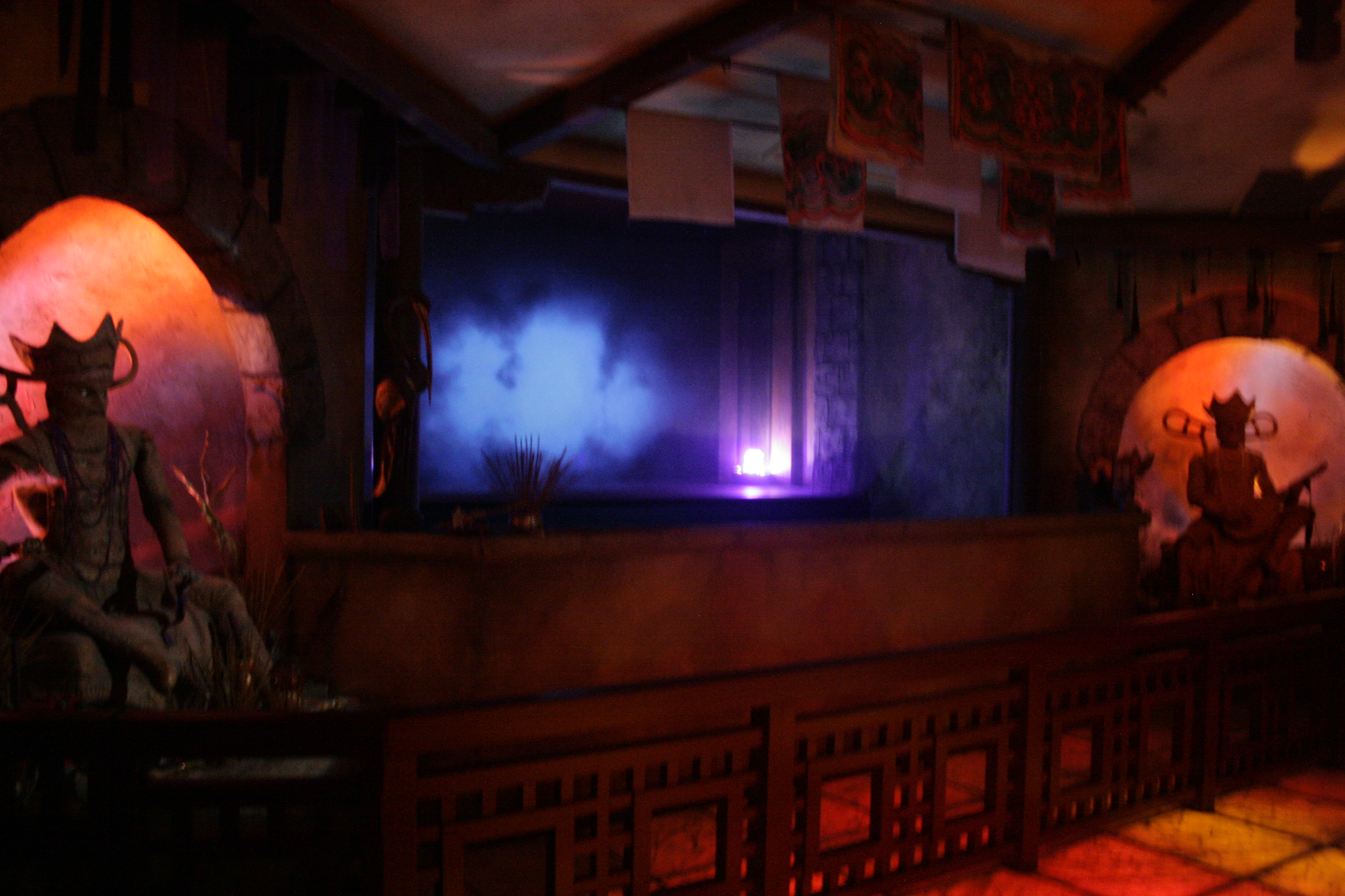 Voorshow van de madhouse Feng ju Palace in attractiepark Phantasialand.